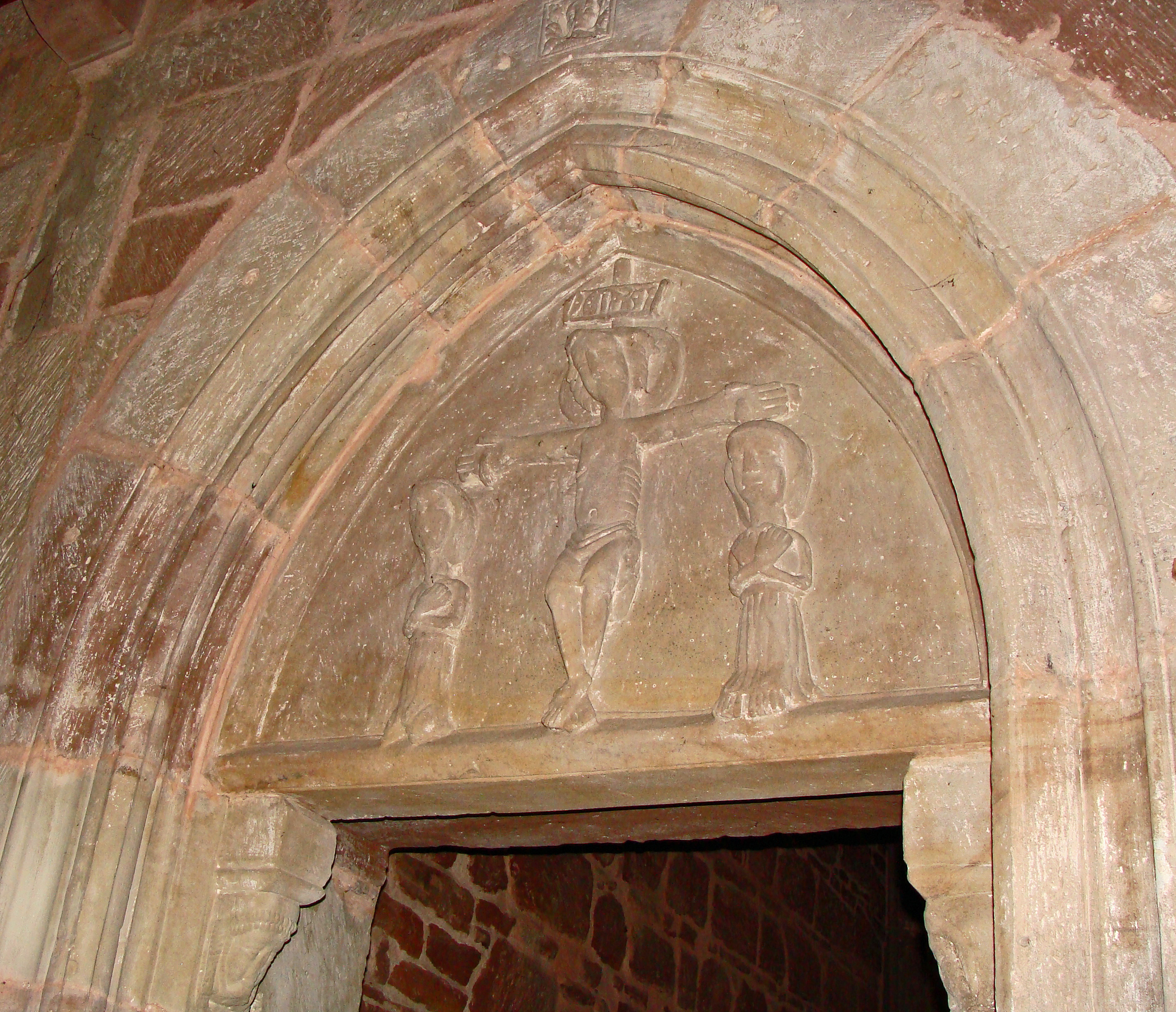 Forbach, vue du tympan (intérieur) de la chapelle Sainte-Croix (22 février 2014). Chapelle gothique du XIIIe siècle.